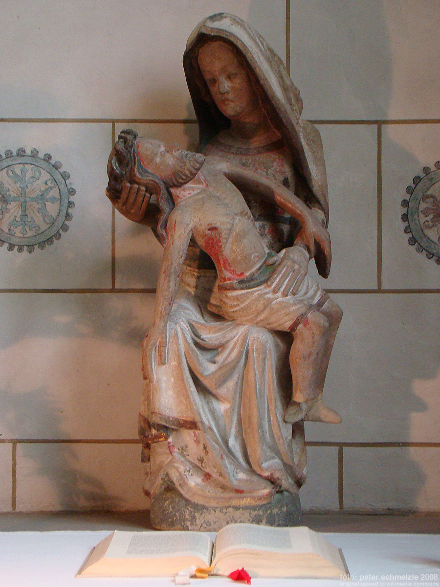 Pieta in der südlichen Seitenkapelle der Stadtkirche Bad Wimpfen